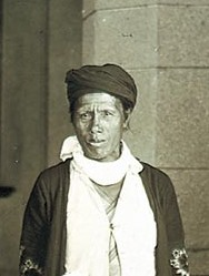 Raho Ari, a Bunun leader